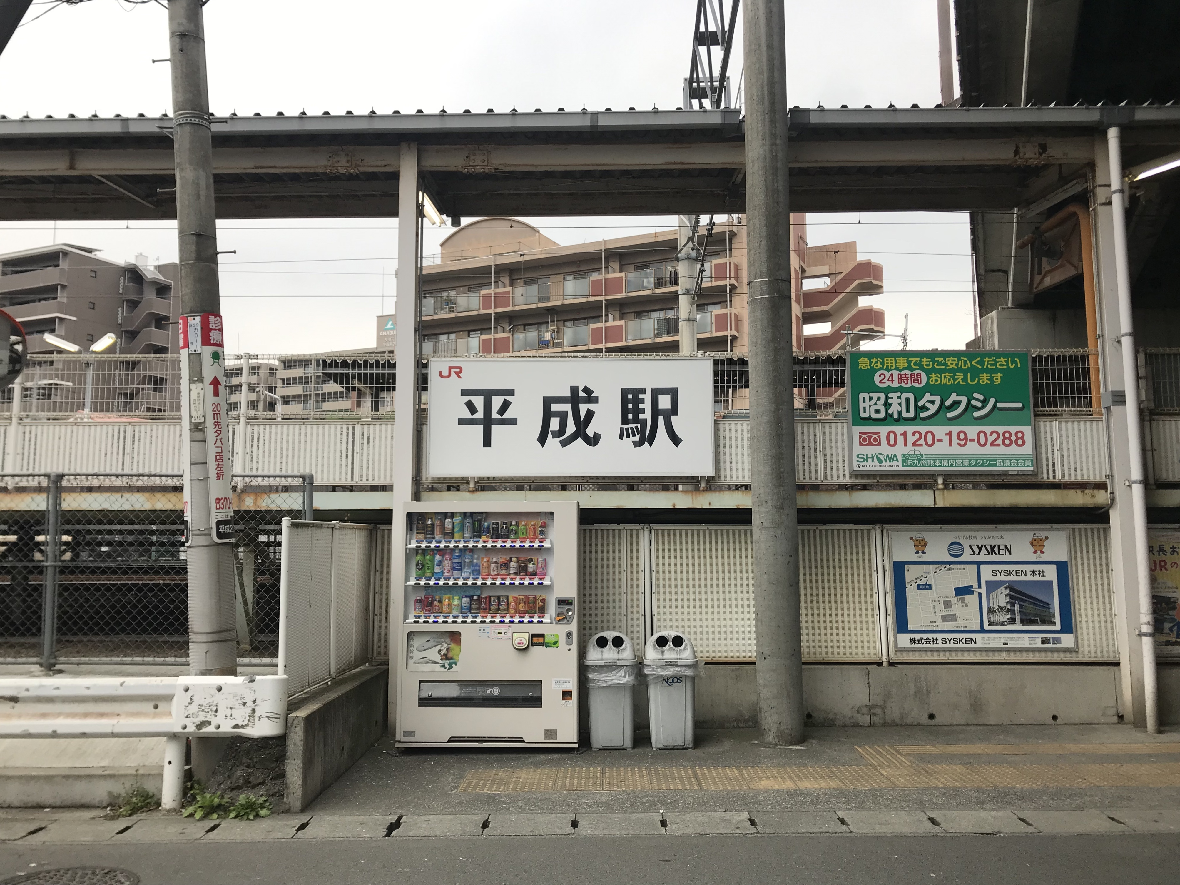 平成駅の駅舎